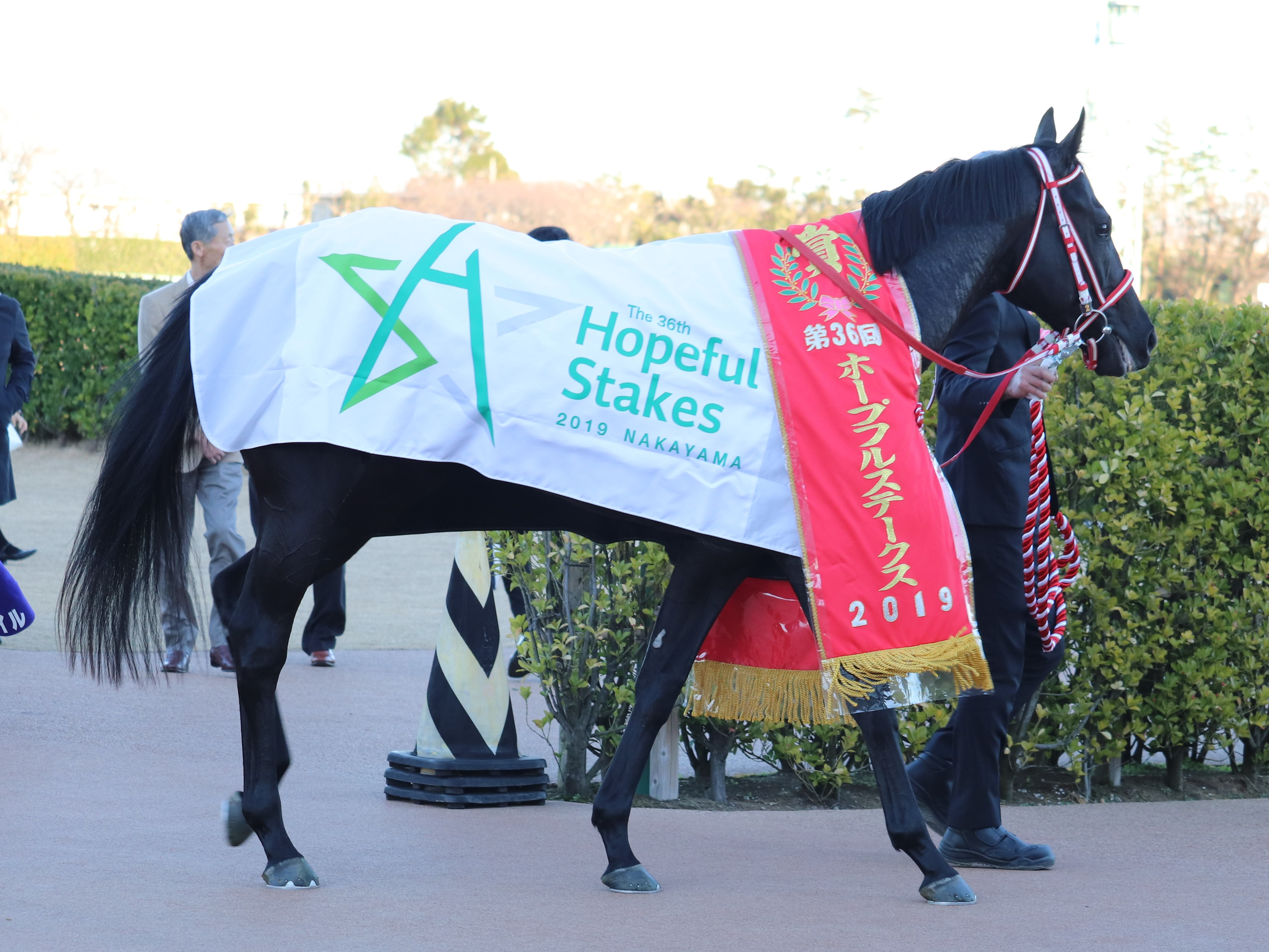 優勝レイをかけられたコントレイル。